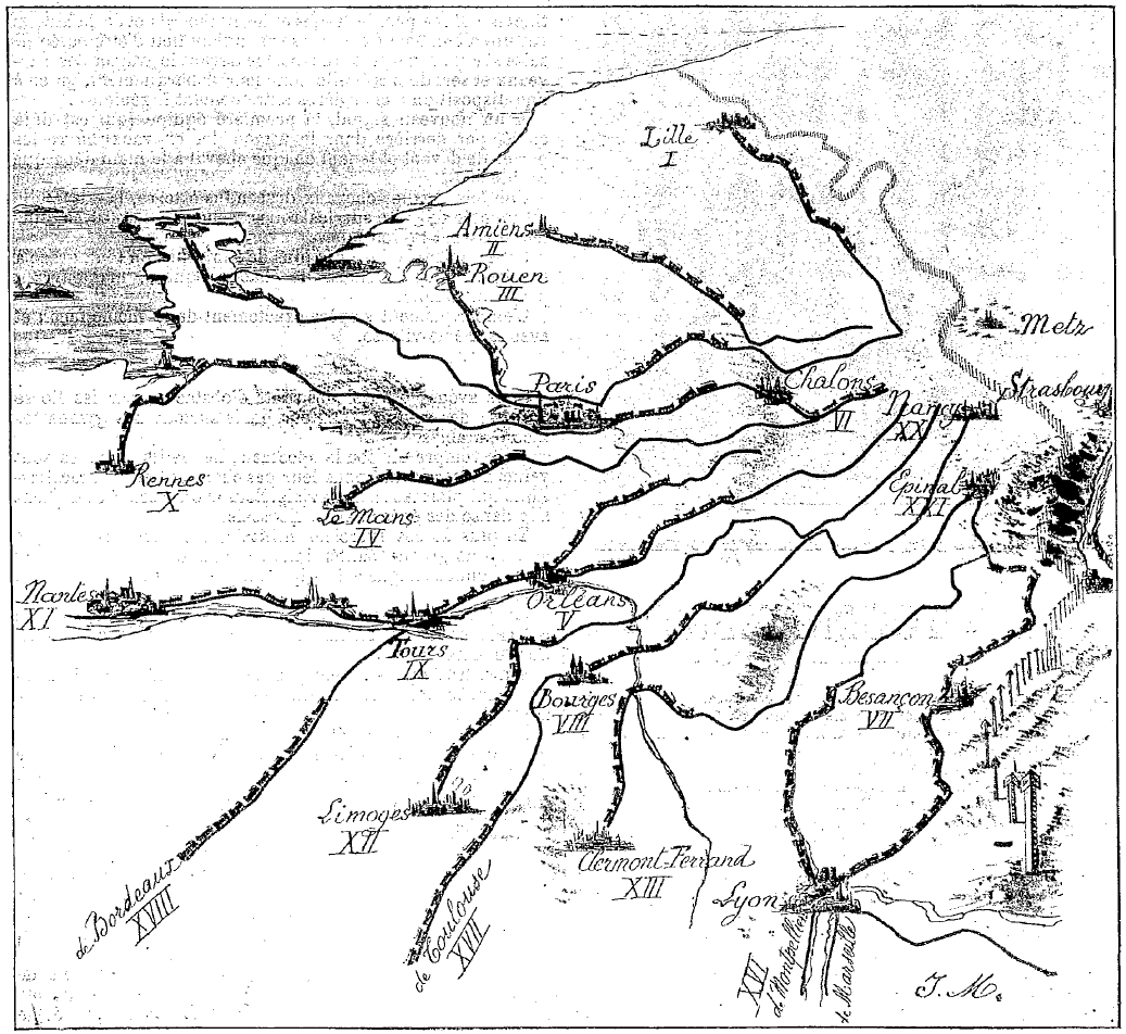 Schéma des lignes ferroviaires permettant la concentration des différents corps d'armée métropolitains le long de la frontière franco-allemande.